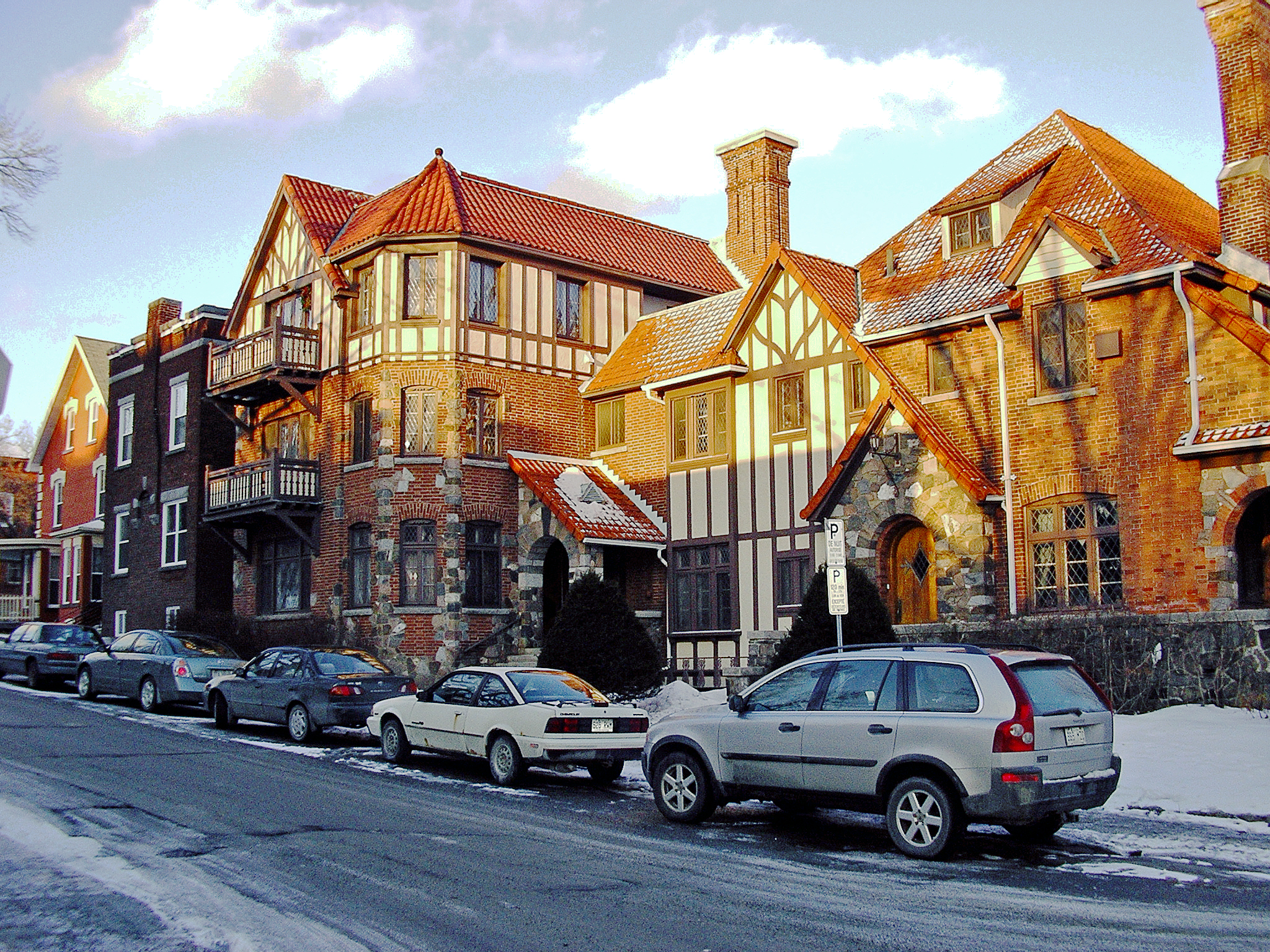 Maison de style néo-Tudor, coin des rues Ball et Brooks, Sherbrooke, hiver 2006